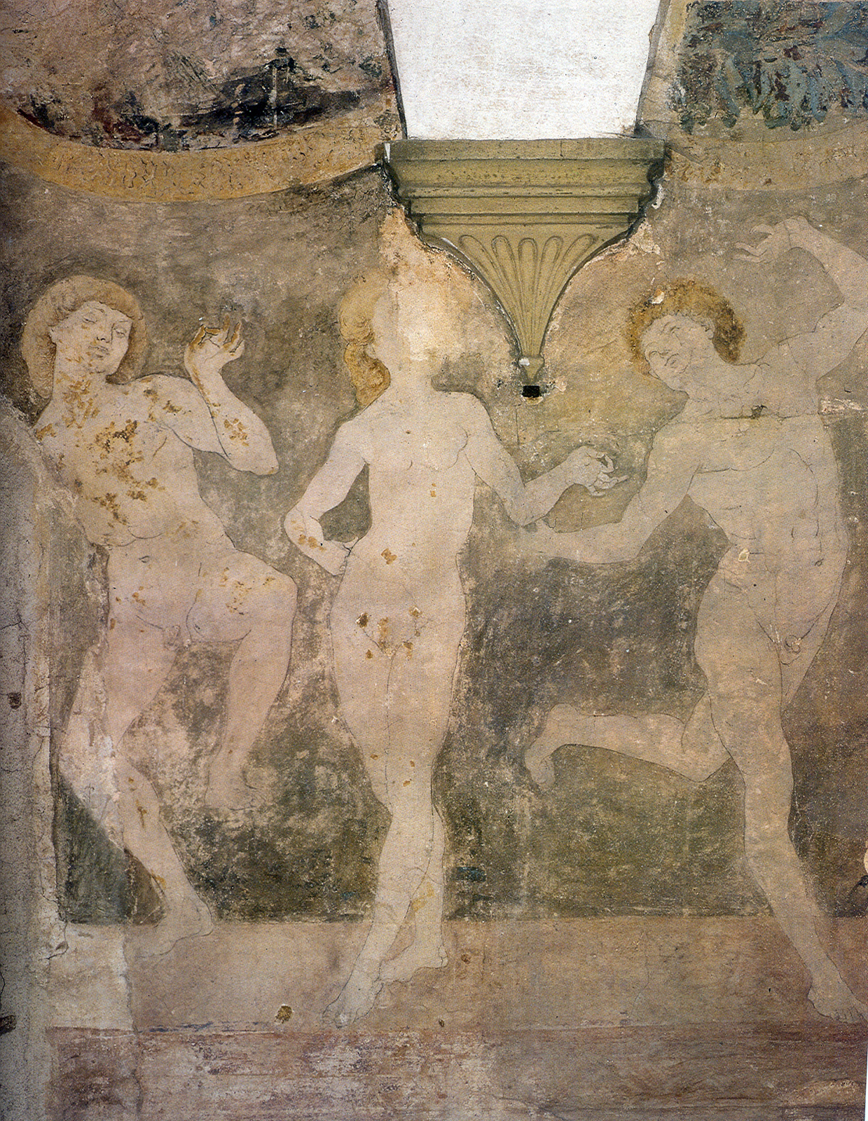 Nude Dancers Antonio del Pollaiuolo Fresco Arcetri, Villa La Gallina